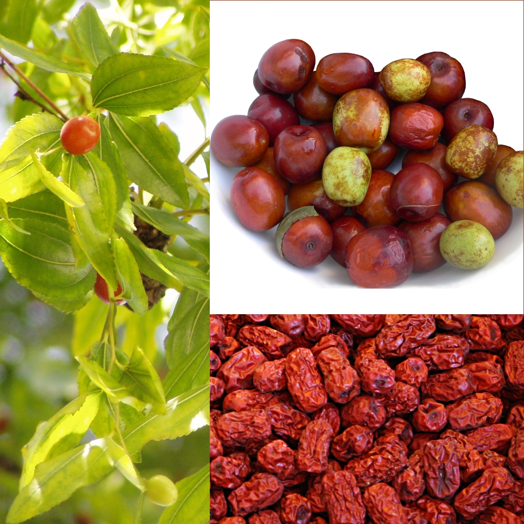 Grafika podręcznika Wikijunior:Owoce. Owoc: jujuba, chiński daktyl; roślina: głożyna pospolita, jujuba pospolita (Ziziphus zizyphus syn. Zizyphus jujuba).